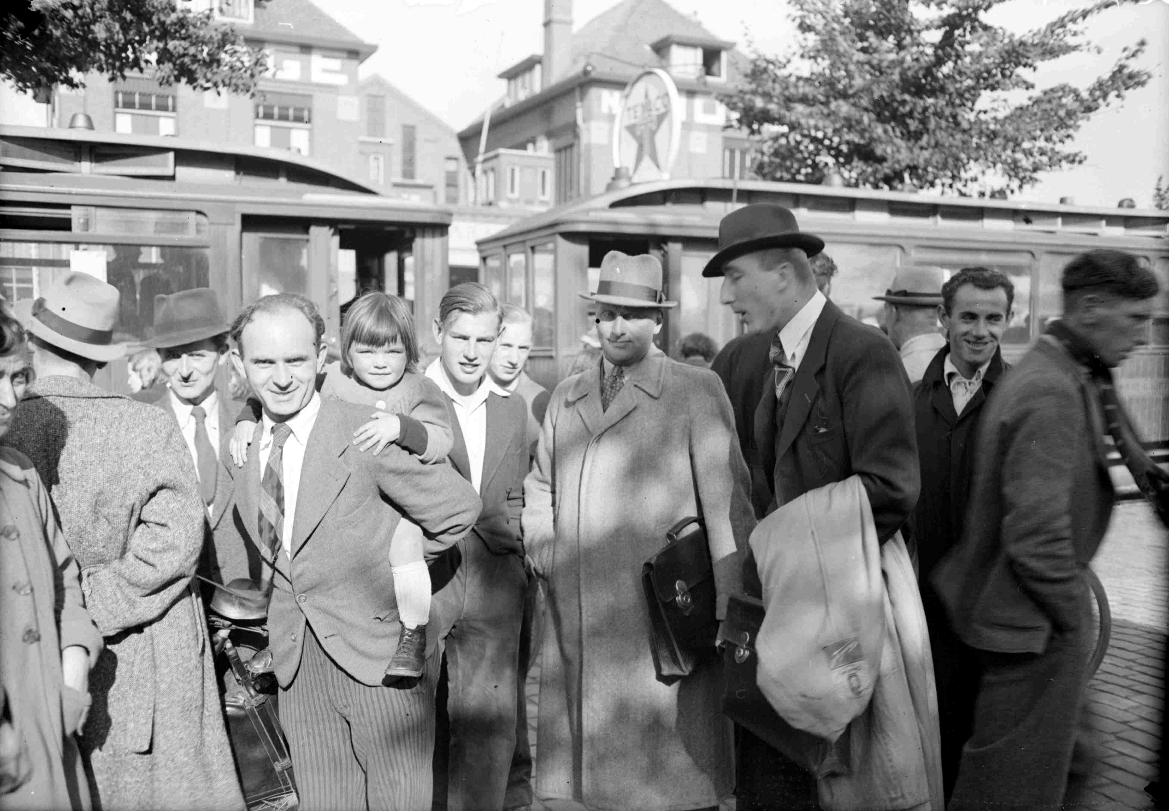 Groep arbeiders vlak voor hun vertrek naar Duitsland voor Garage Moll.